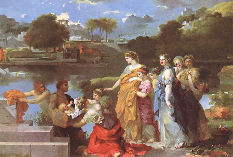 Kategori:Målningar